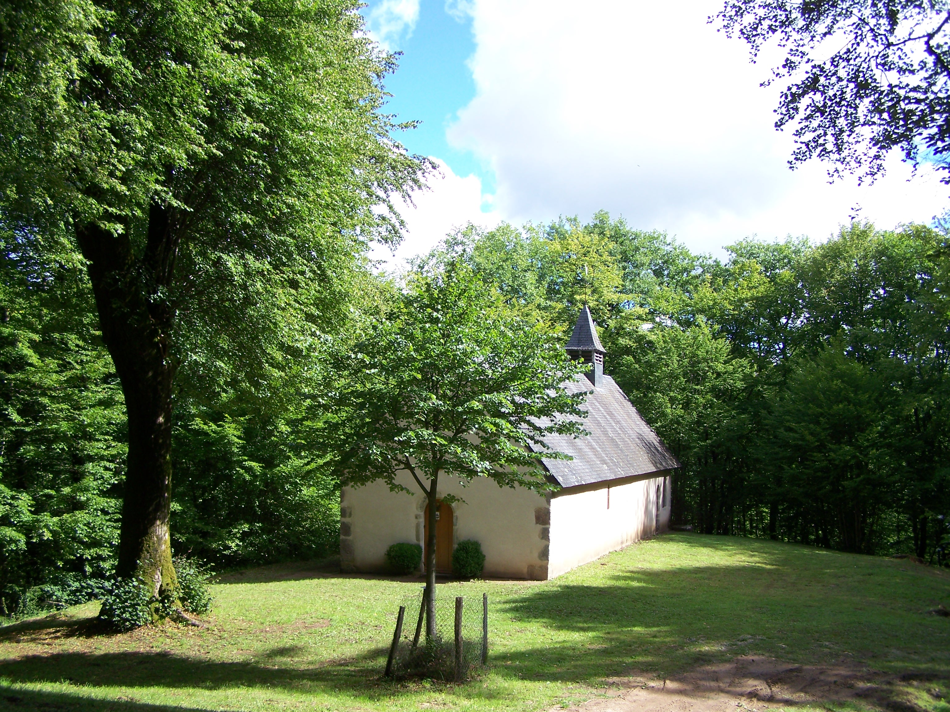 La chapelle de Faubouloin et son tilleul à Corancy (Nièvre, France).